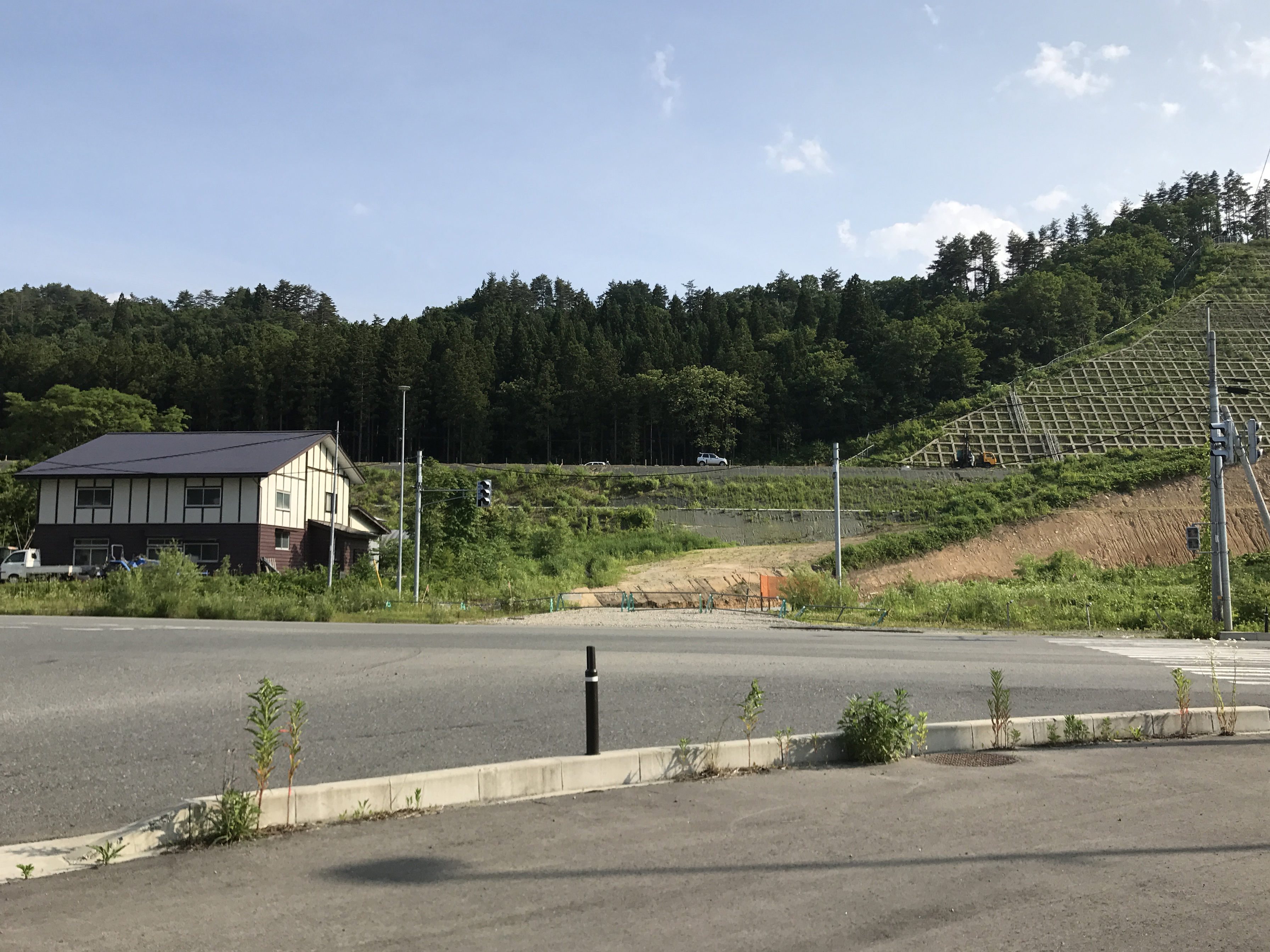 建設中の東北中央自動車道 米沢八幡原IC